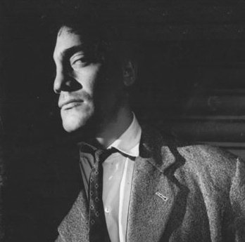 Foto de Alias Gardelito (1961), de Lautaro Murúa. Argentina. En la foto Walter Vidarte.